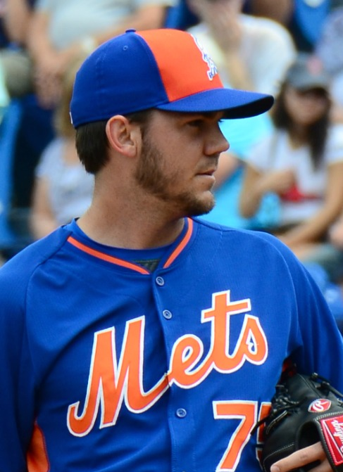 Tyler Pill.